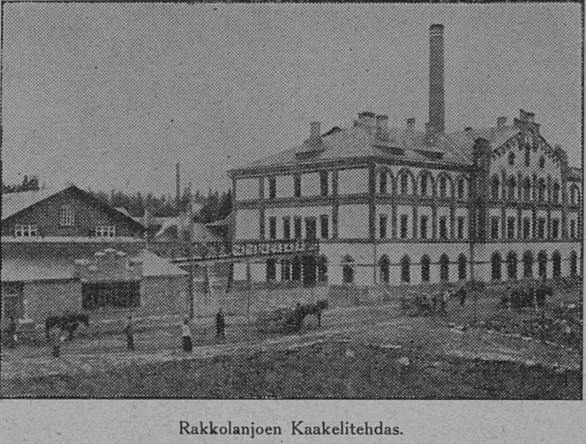 Rakkolanjoen kaakelitehdas